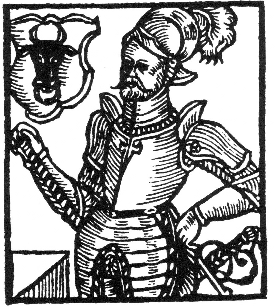 Vratislav z Pernštejna +1582